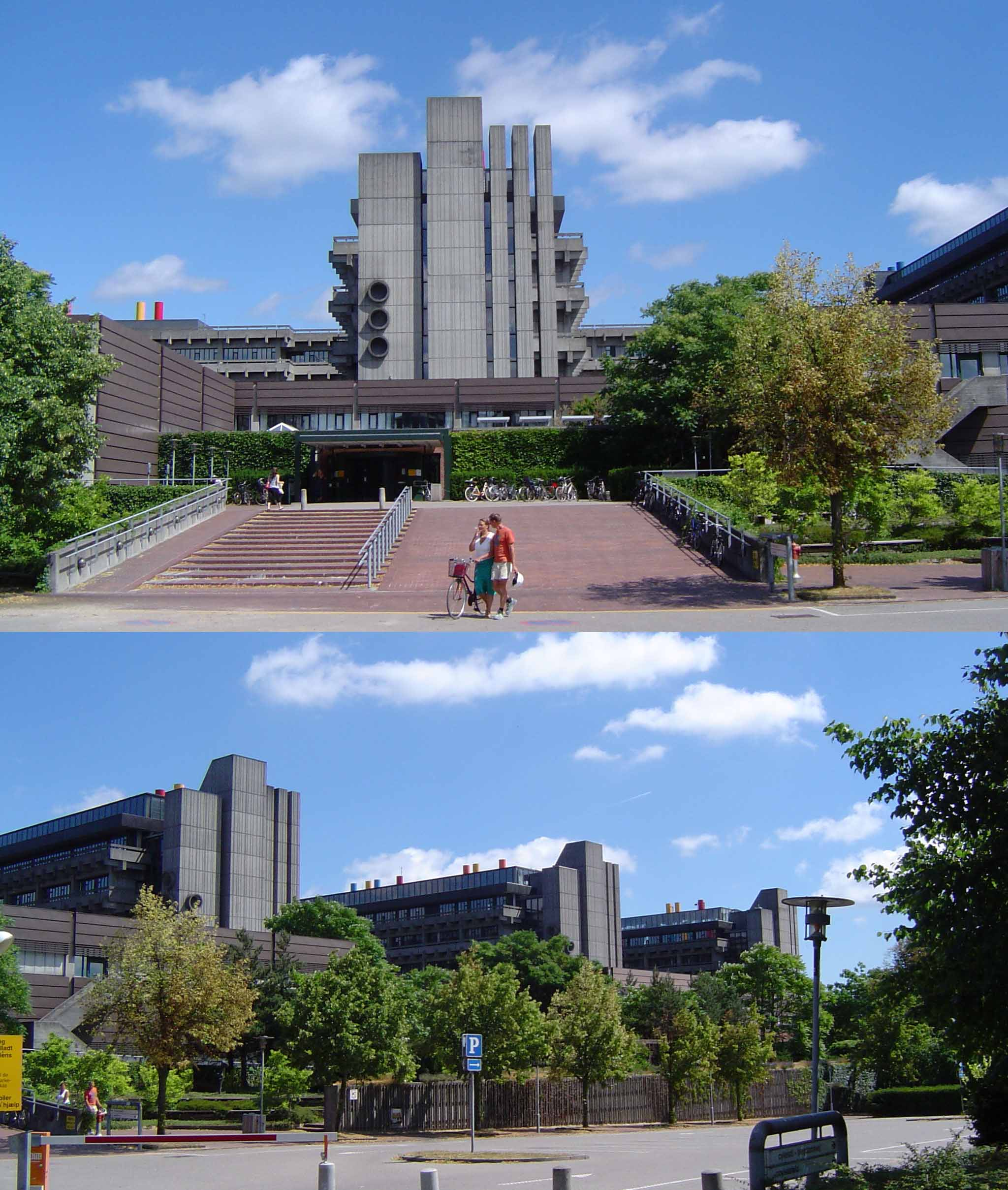 Billede af Panum instituttet fra Nørre allé siden